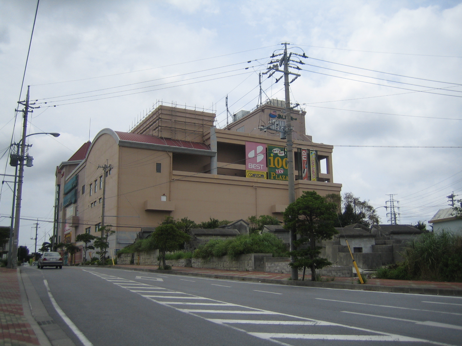 改装前のコリンザ